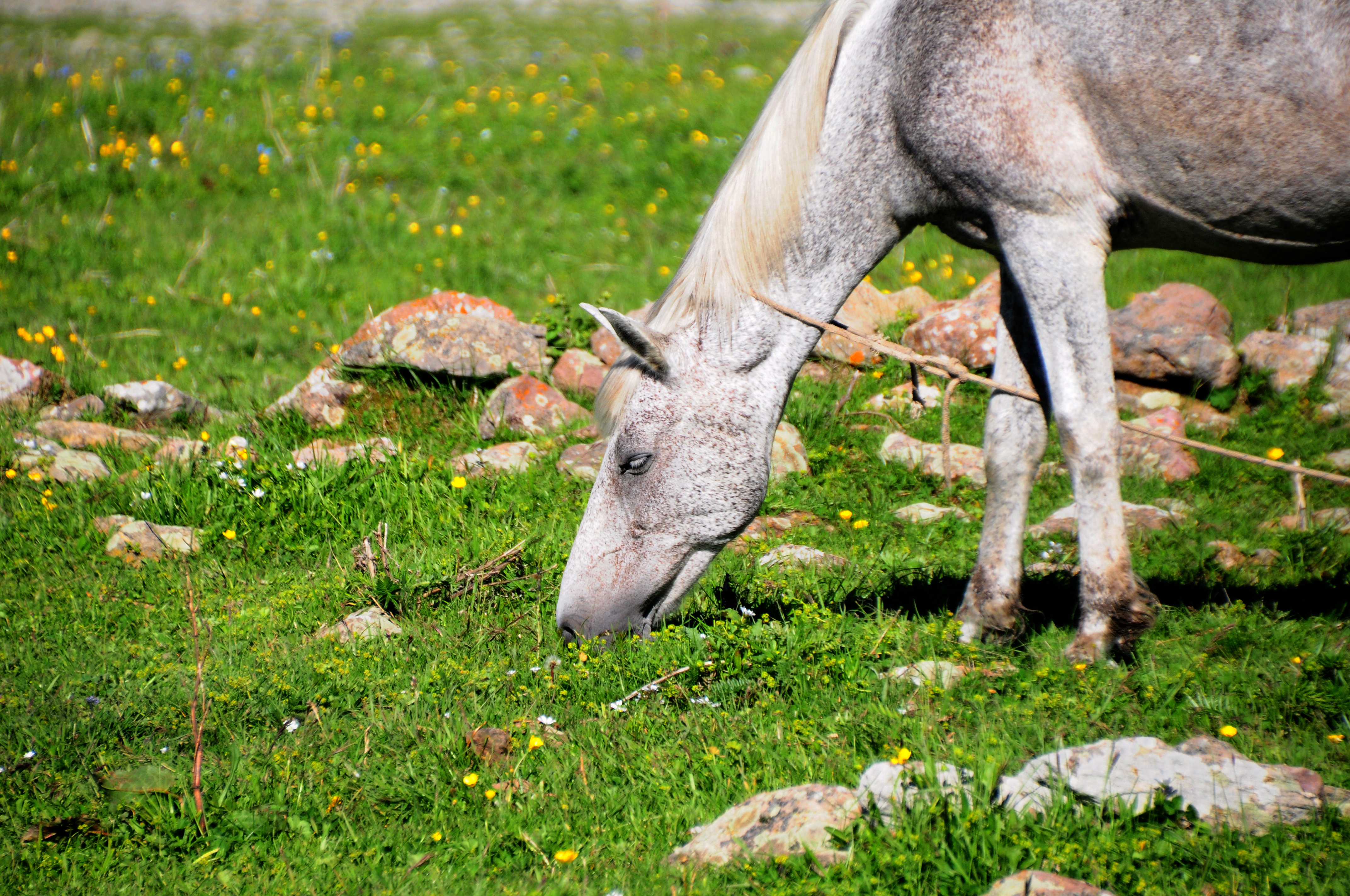 18625 Paravani